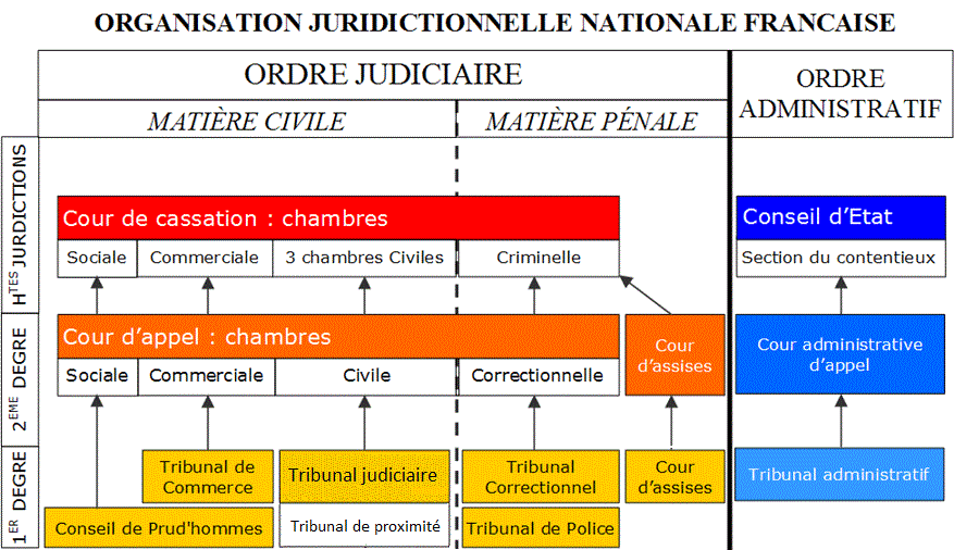 Schéma de l'organisation juridictionnelle nationale française. Créé par moi-même grâce à Microsoft Publisher (simplement)... Catégorie:Justice judiciaire